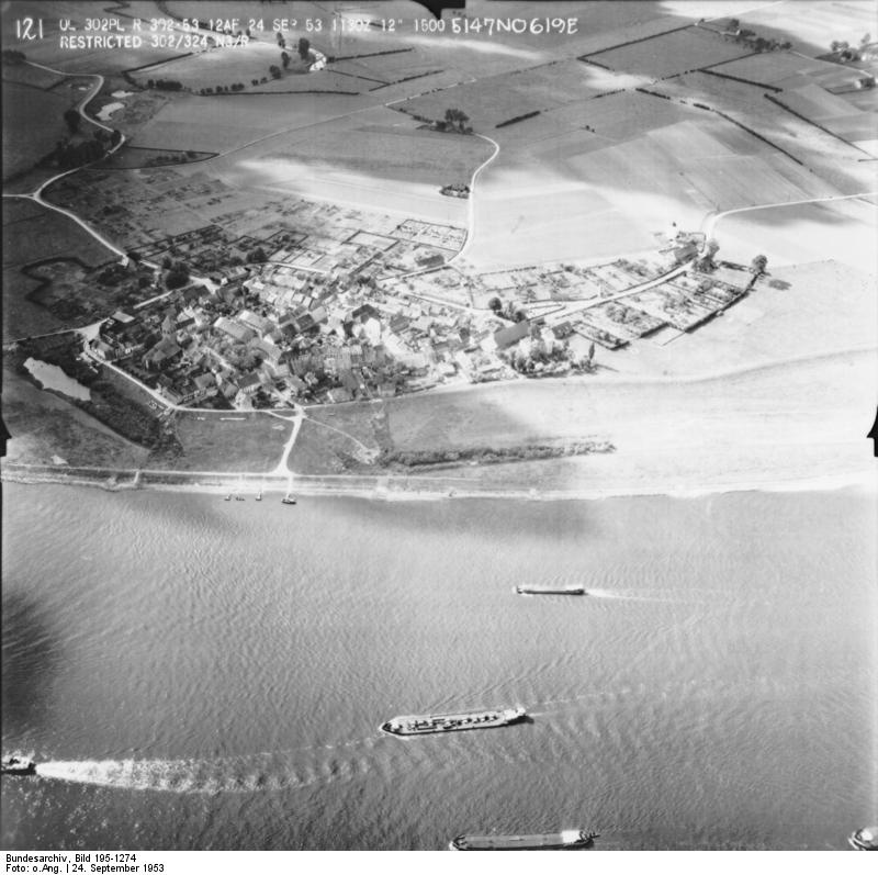 Rheinbefliegung der Alliierten 1953